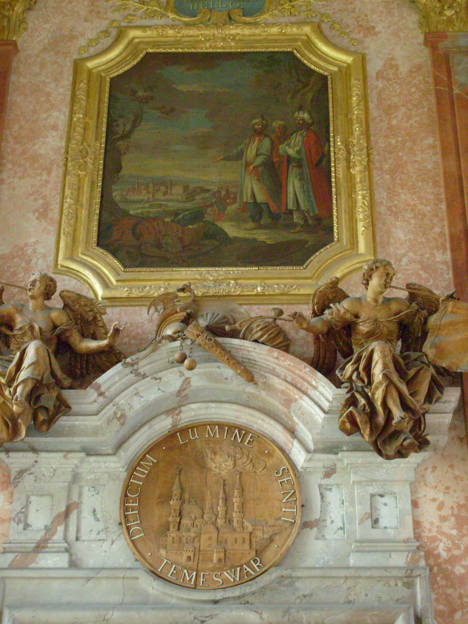 Bartolomeo Altomonte: Die Befreiung der Festung Temeswar. Augustinerchorherrenstift St. Florian.